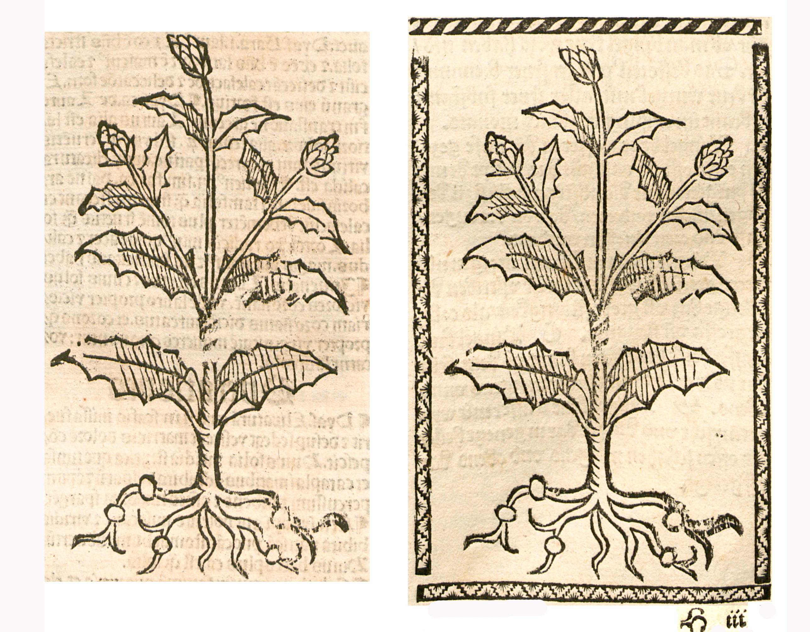 Abbildung von Bingelkrut (Mercurialis spec.)